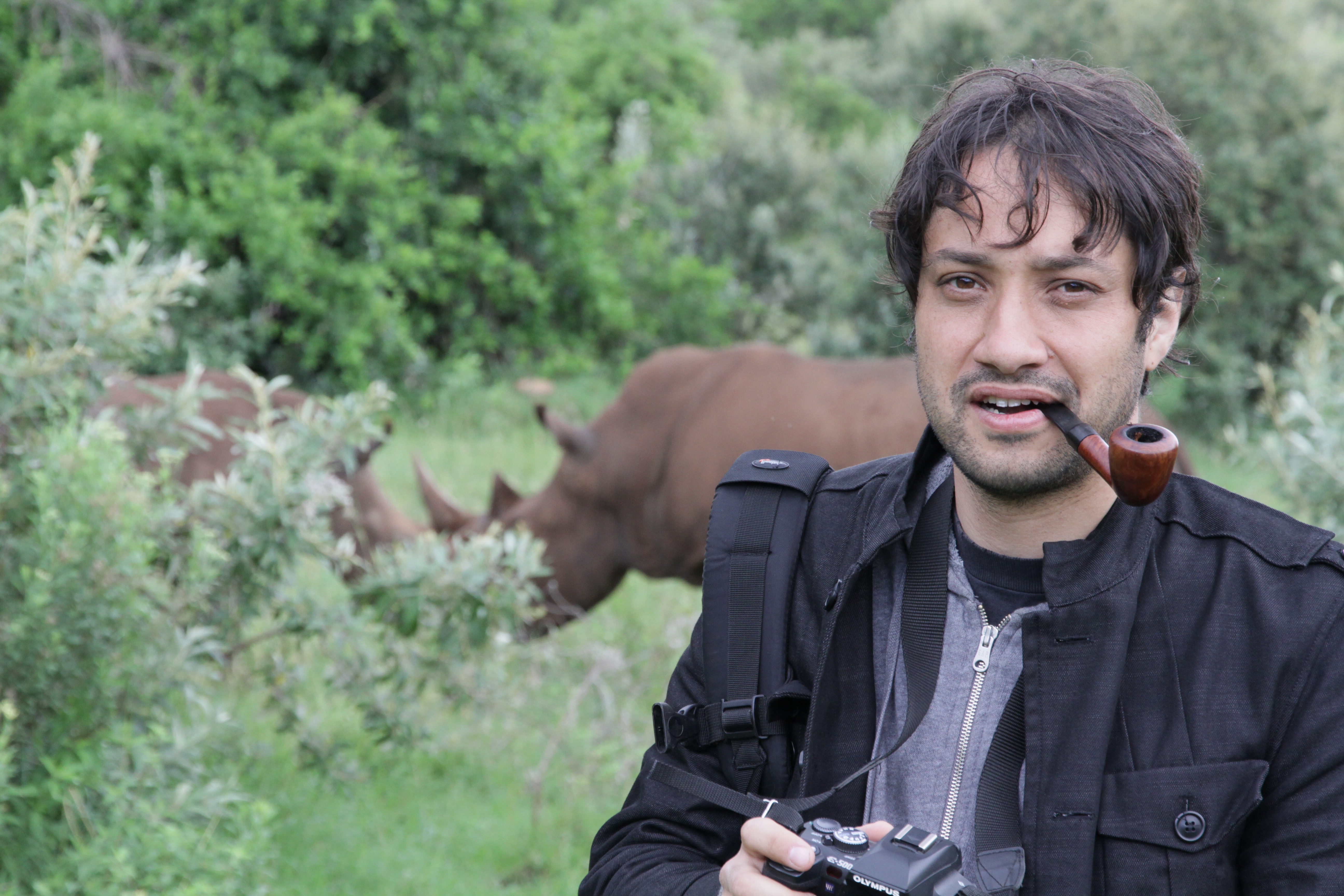 Mila Aung-Thwin